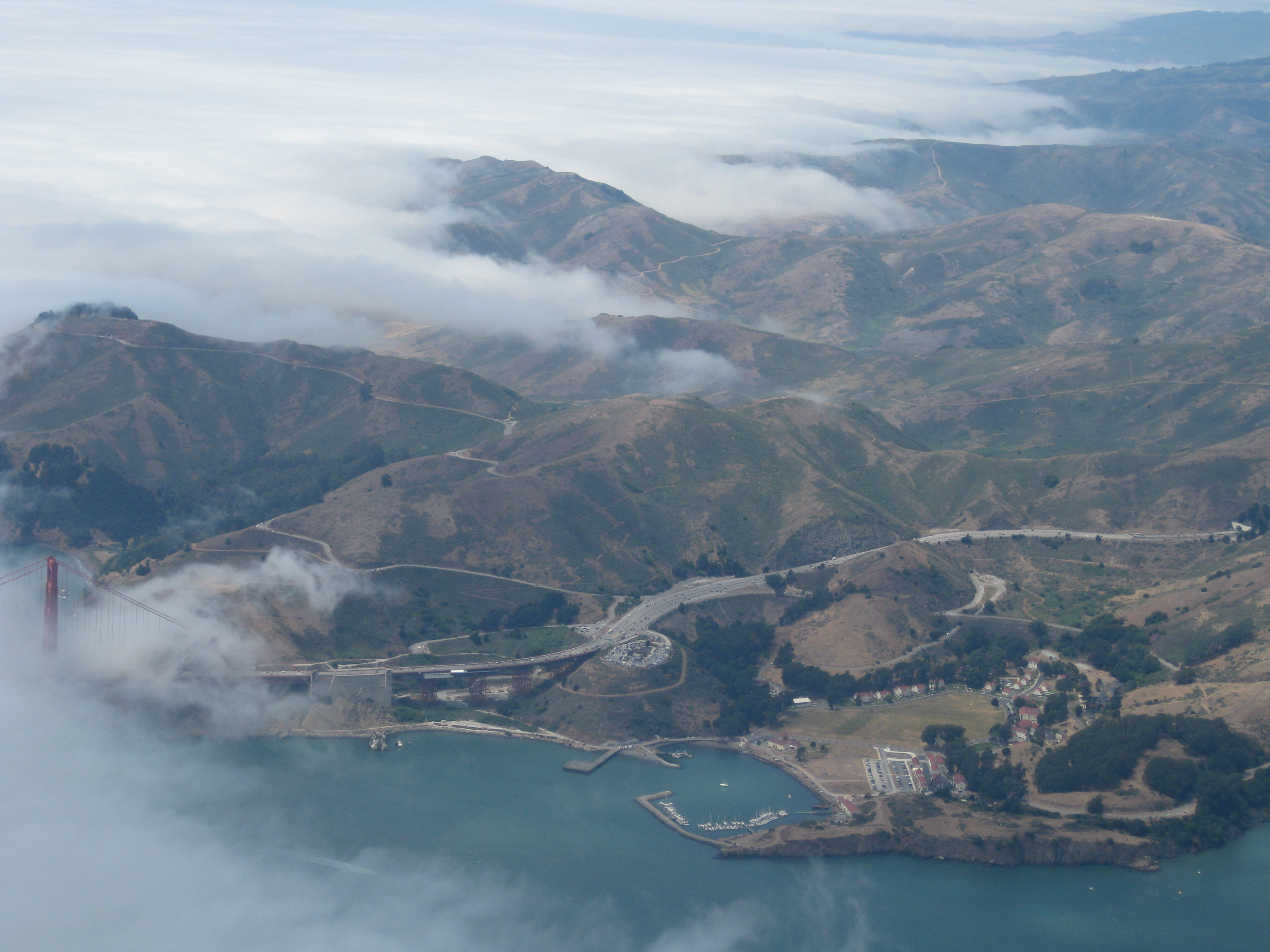 Fort Baker, Golden Gate NRA, Calif.